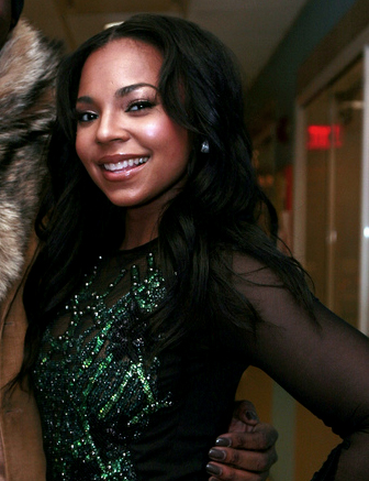 R&B singer Ashanti in 2012